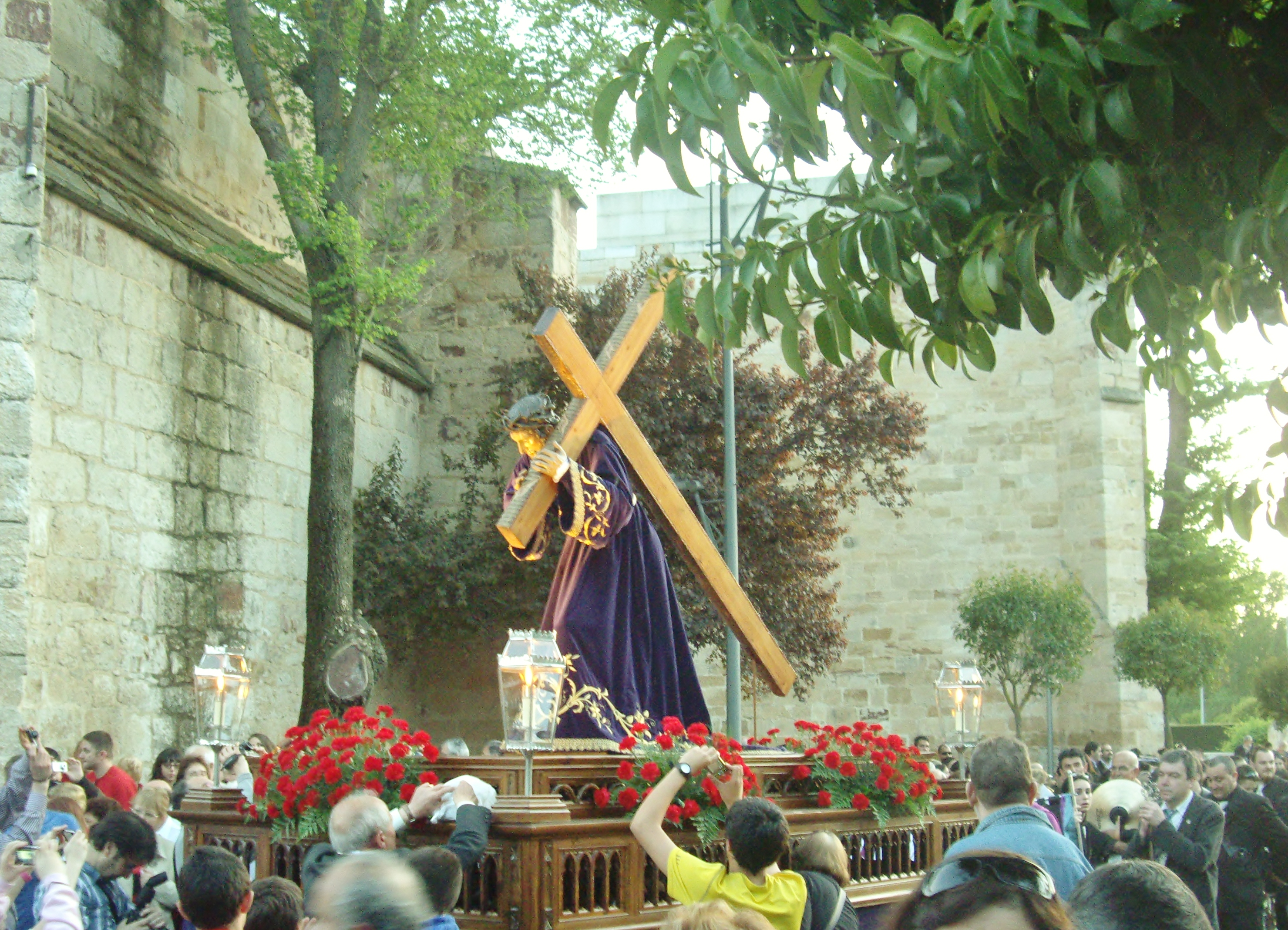 Traslado del Nazareno de San Frontis, Zamora, España, 2011